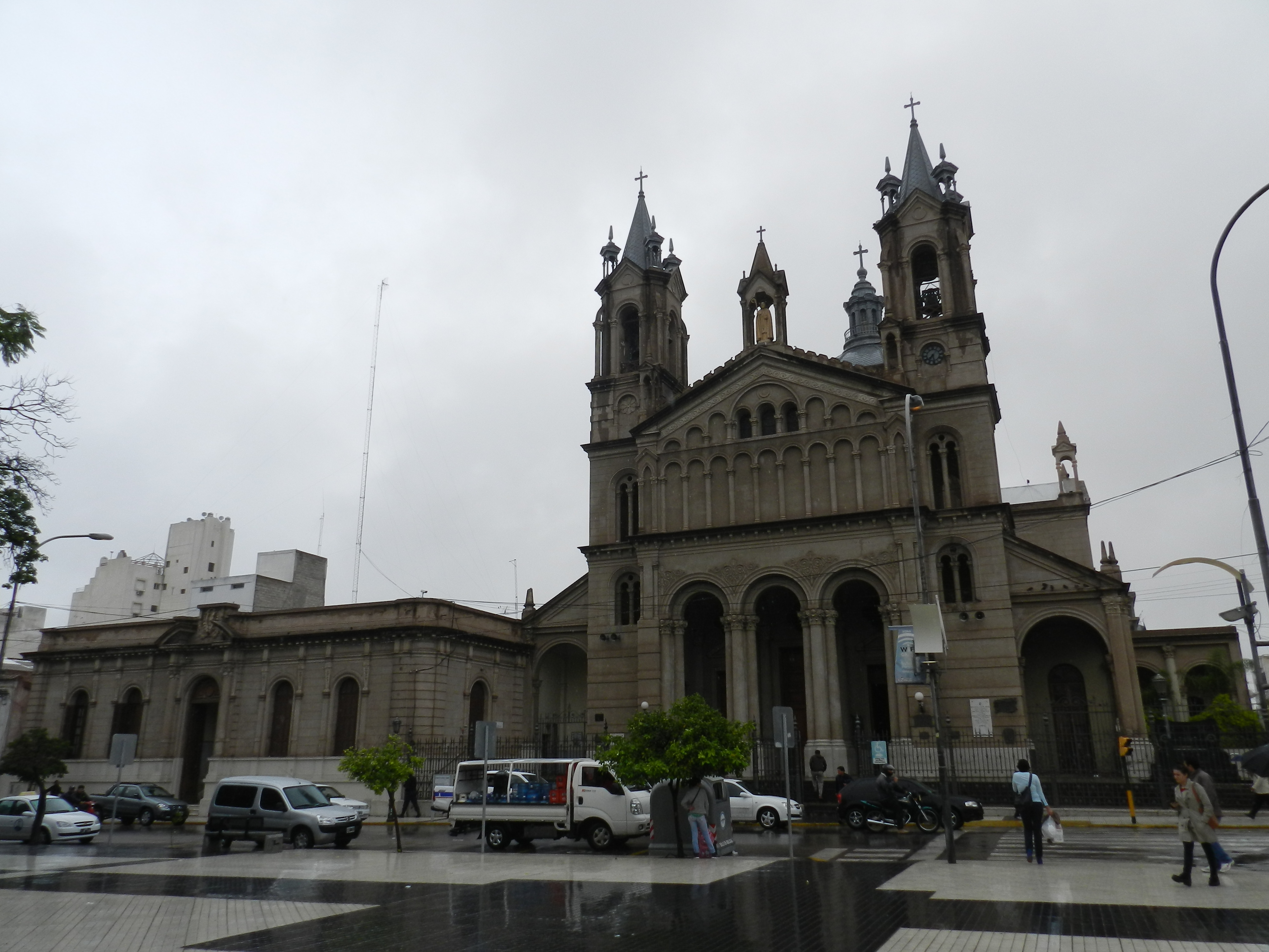 Catedral de La Rioja vista desde la plaza 25 de Mayo.